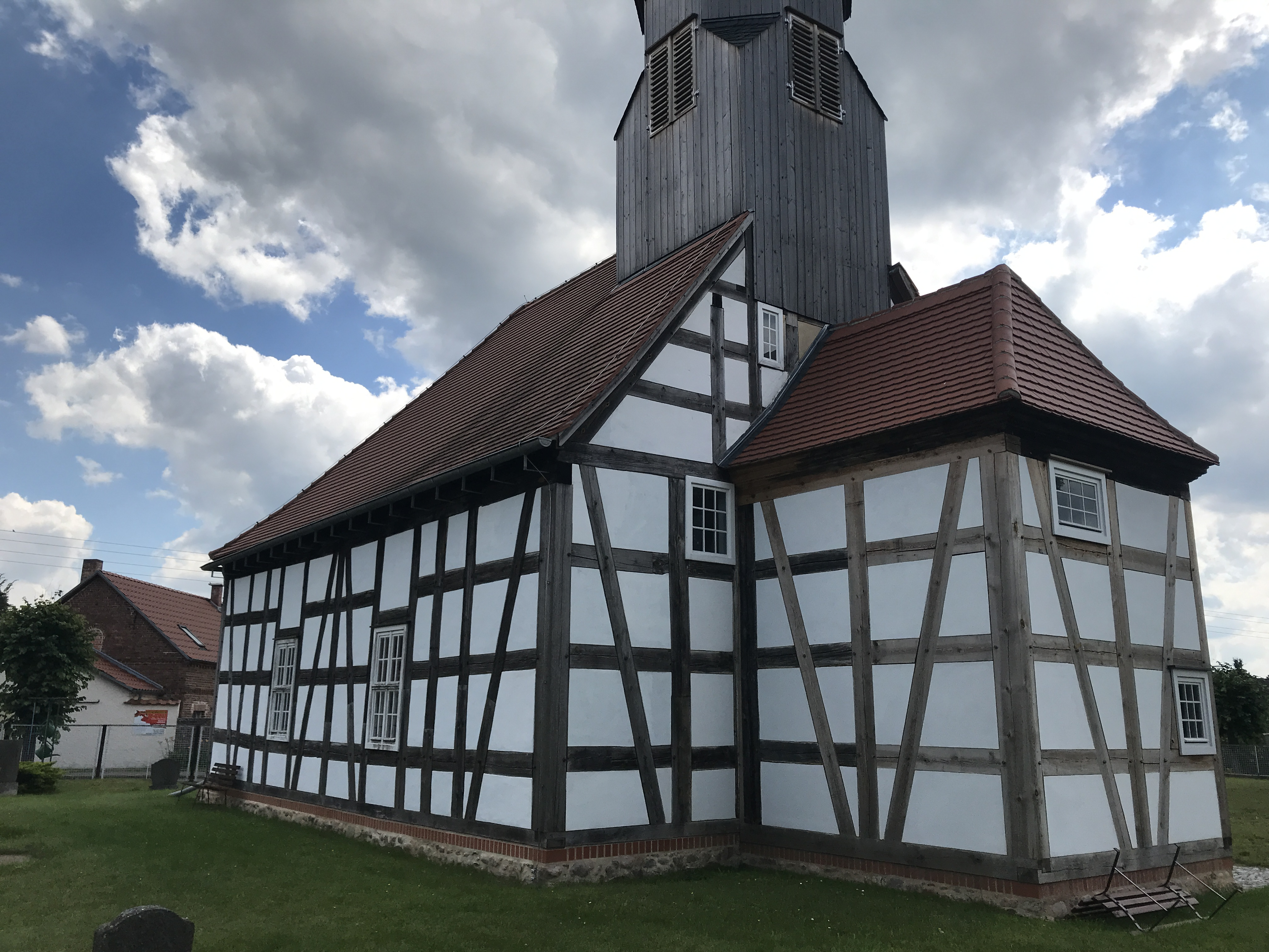 Die Dorfkirche Chossewitz in der Stadt Friedland im Landkreis Oder-Spree ist eine Fachwerkkirche aus der Zeit um 1730. Im Innern steht unter anderem ein Kanzelaltar aus dem Ende des 18. Jahrhunderts.